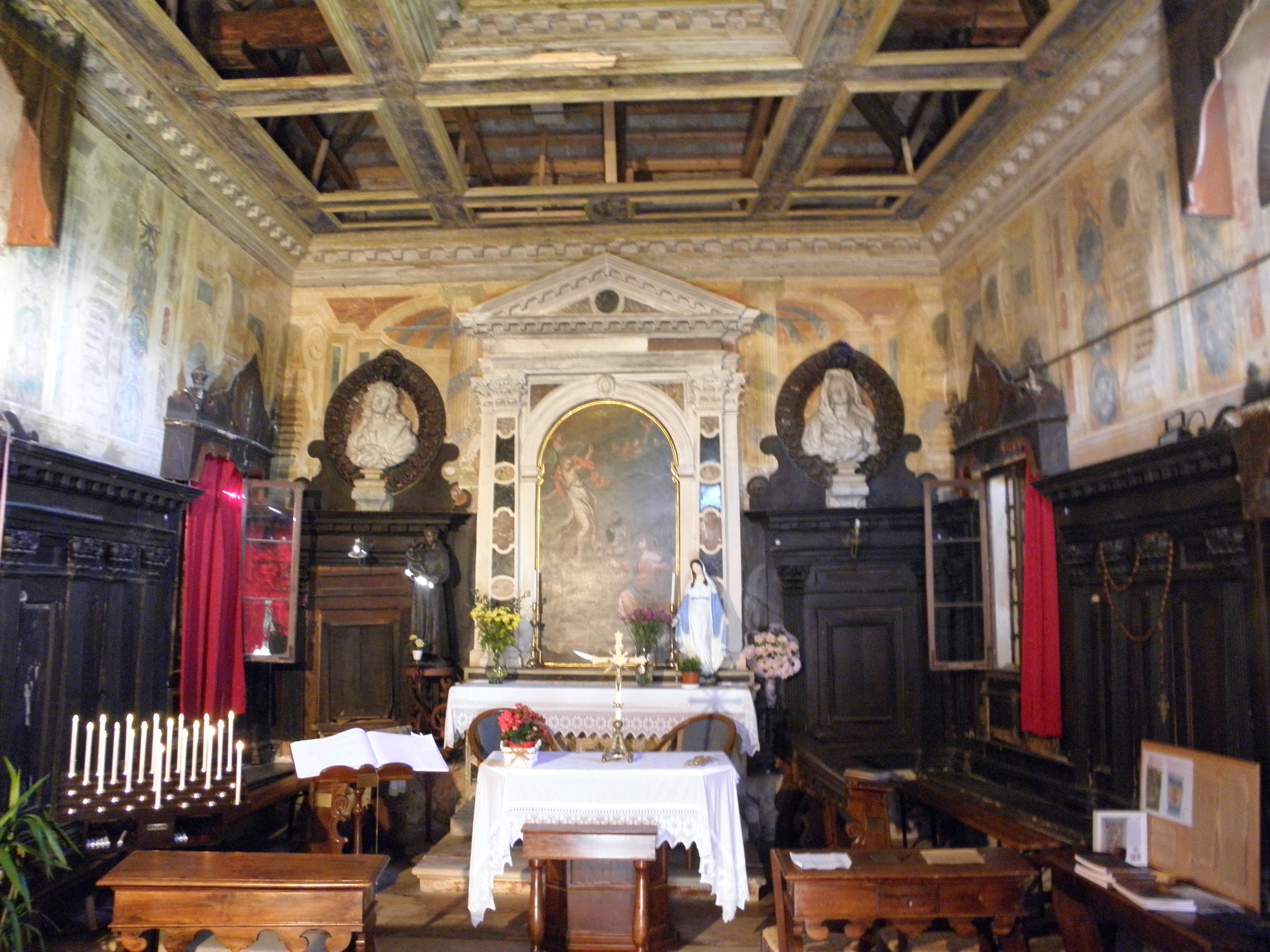 Pontemanco, frazione di Due Carrare: Oratorio della Santissima Annunciata, interno.